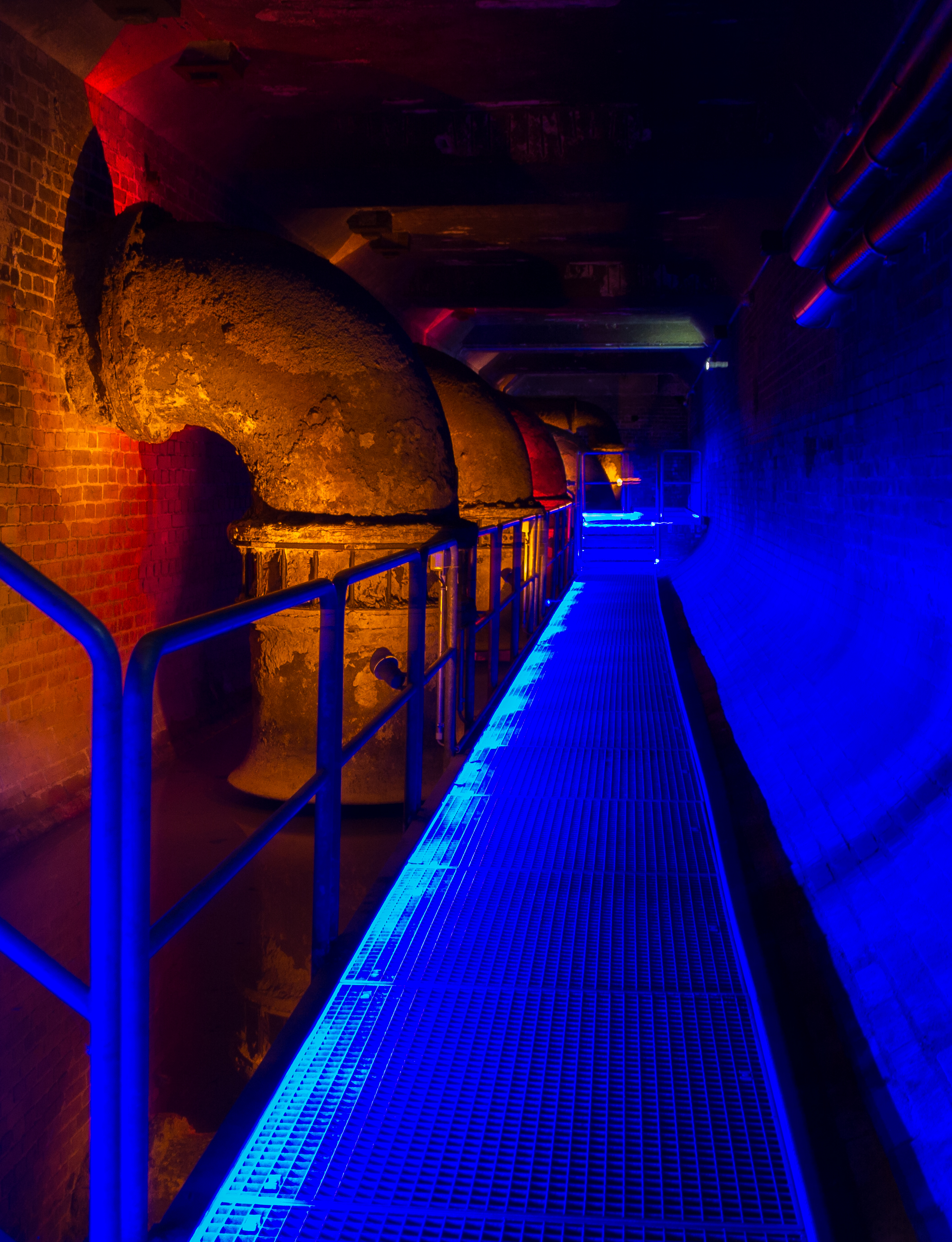 Hauptpumpwerk I, Pumpensumpf im Maschinenhaus in Bremen, Bayernstraße 129Das abgebildete Objekt ist ein geschütztes Kulturdenkmal in der Freien Hansestadt Bremen, mit der Nr. 0423 beim Landesamt für Denkmalpflege registriert.